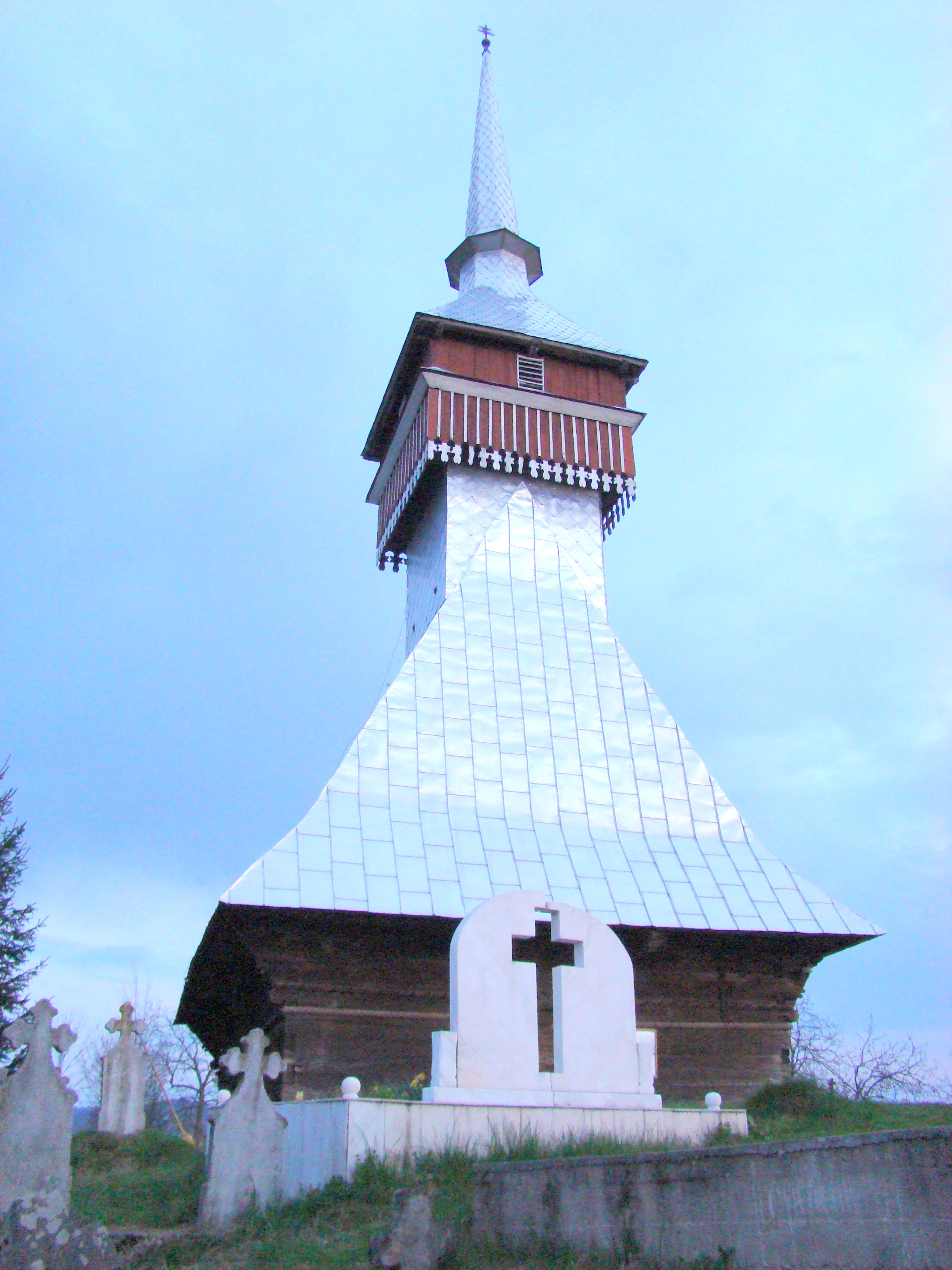 Biserica de lemn "Sf. Ioan Teologul", sat BRĂDET; comuna BUNTEŞTI